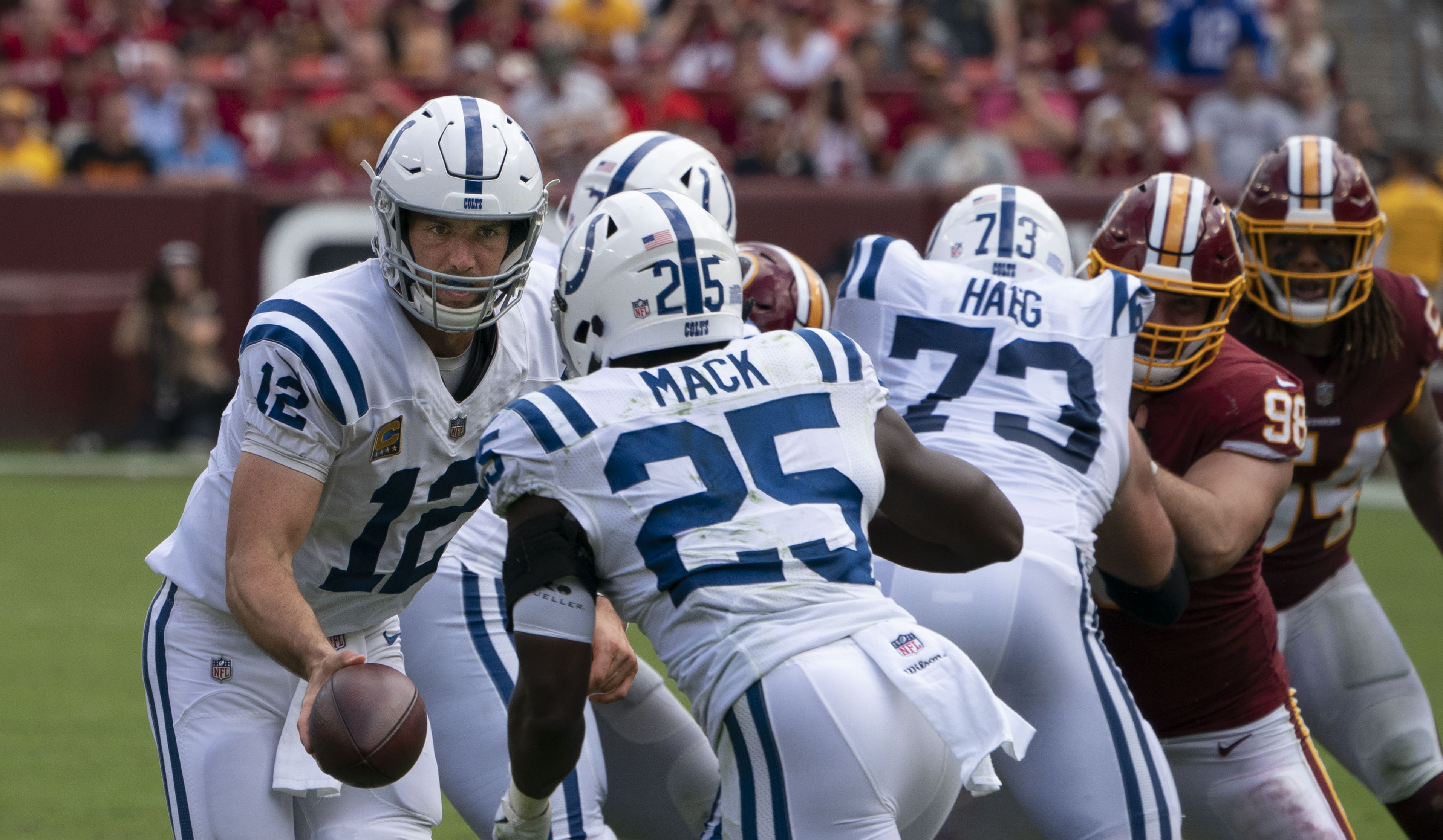 Colts at Redskins 09/16/18